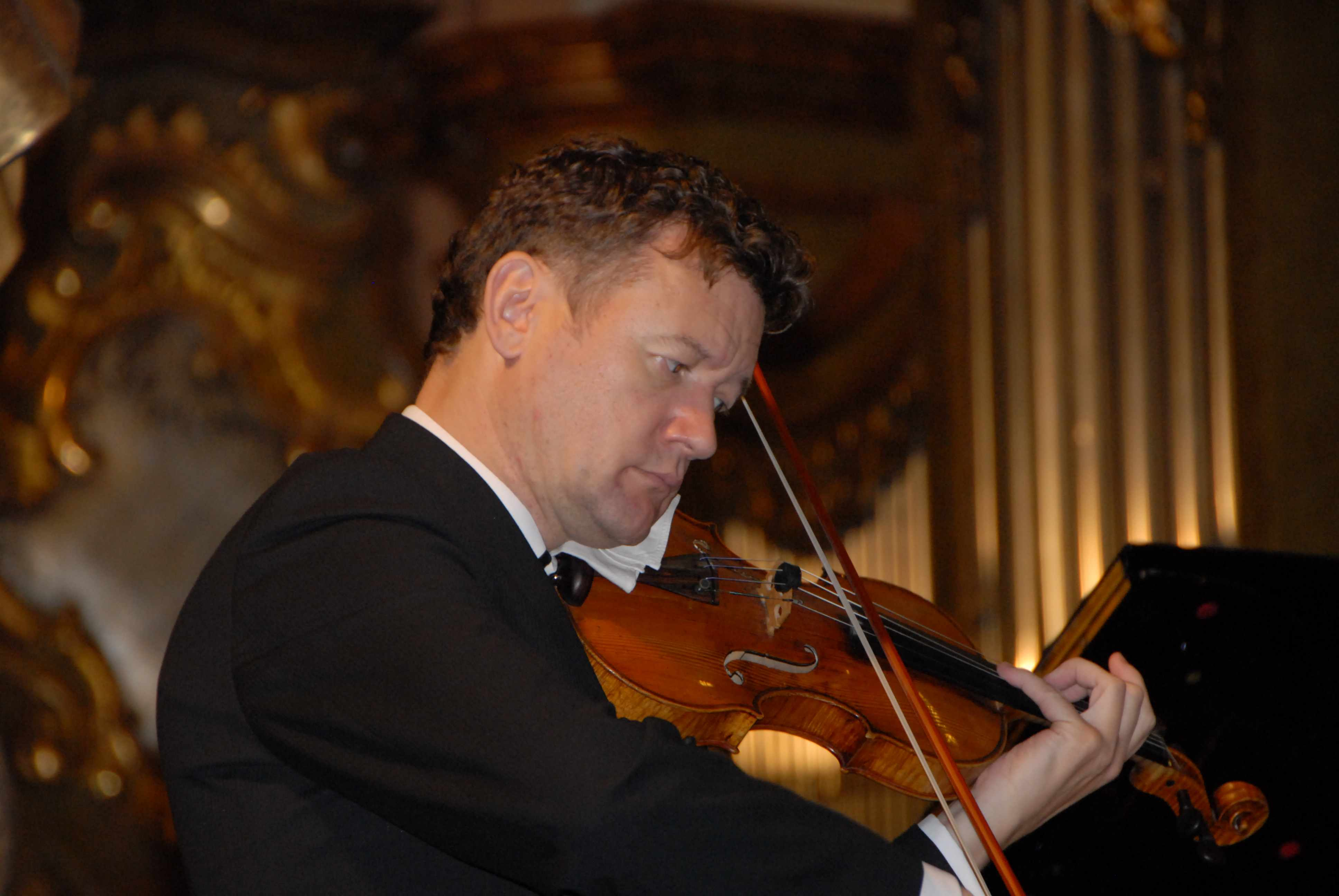 Houslista Ivan Ženatý ve Vrchlabí, Konzert k poctě rodáka Karla Halíře